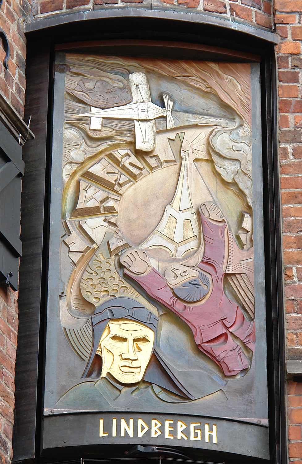 Bernhard Hoetger: Charles A. Lindbergh (1934, Ozean-Bezwinger auf 10 Bildtafeln). Standort: Haus des Glockenspiels in der Böttcherstraße, Bremen